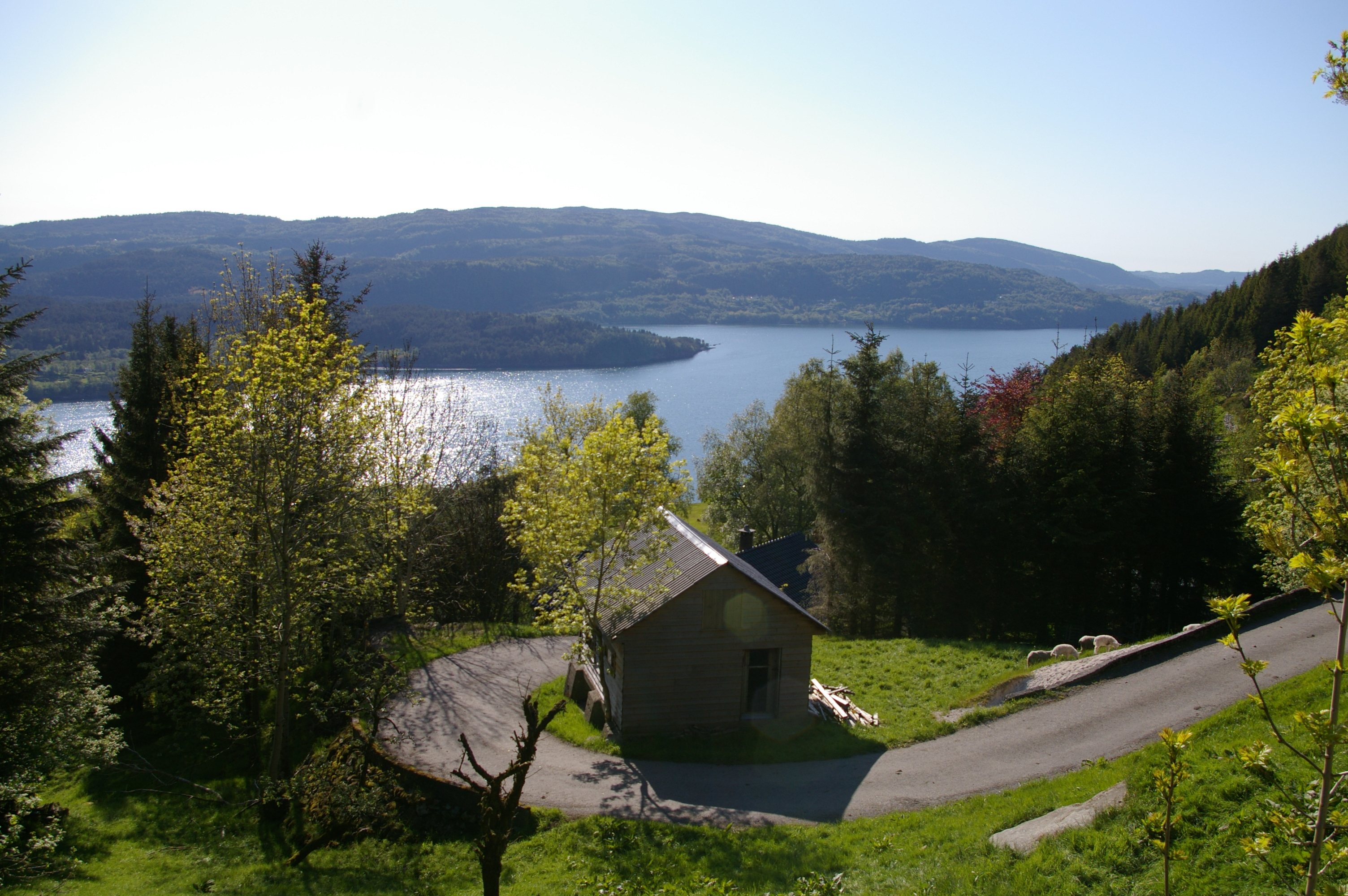 Hindenesfjorden seen from Øvre Veland, Lindås, Hordaland, Norway.